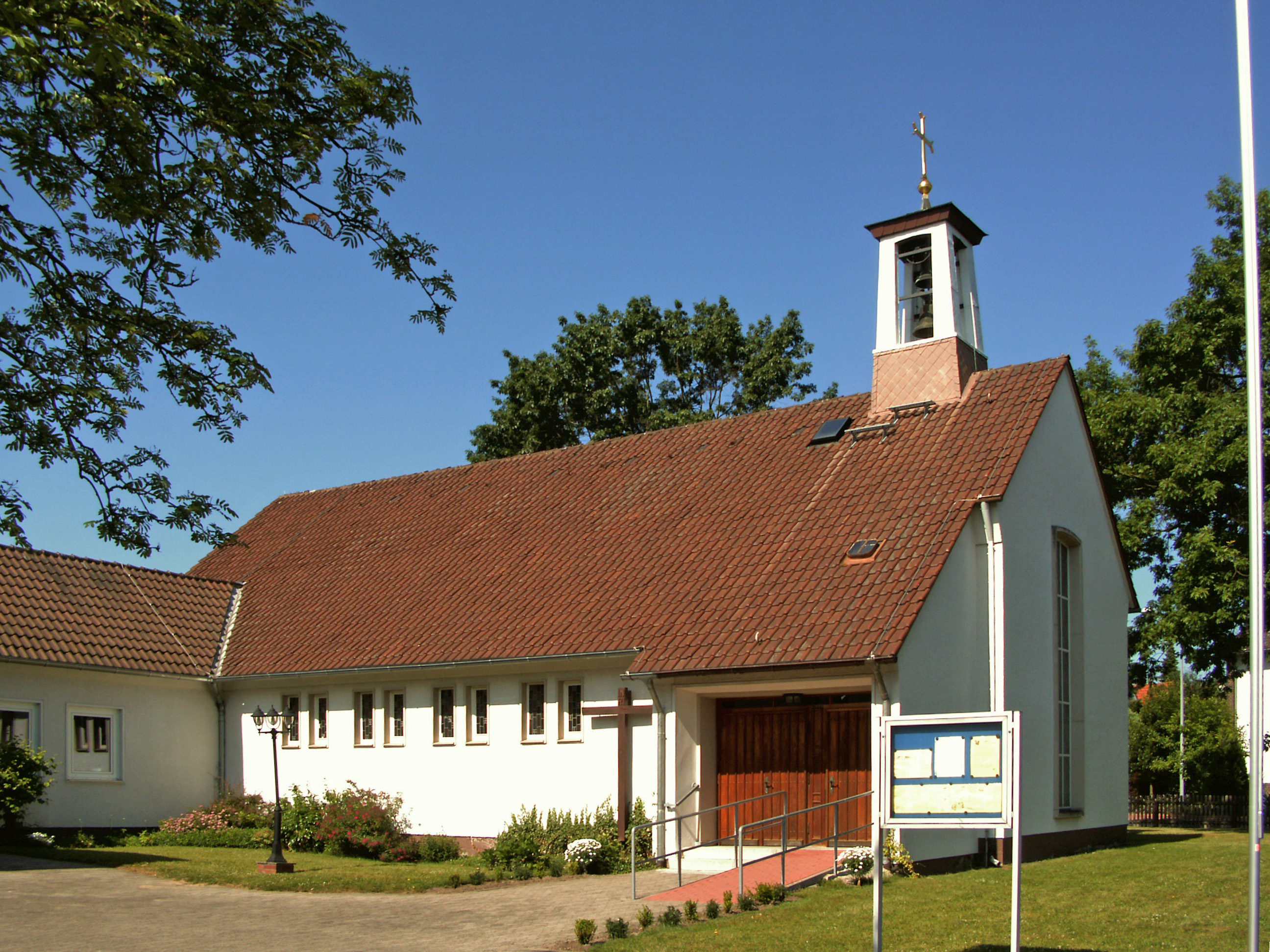 Katholische Kirche St. Matthias in Uetze, Region Hannover